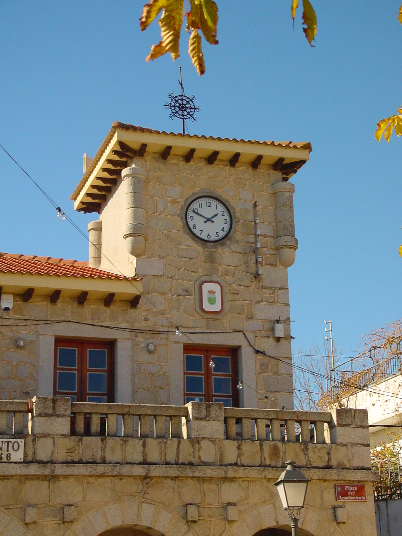 Ayuntamiento de Cabanillas de la Sierra.